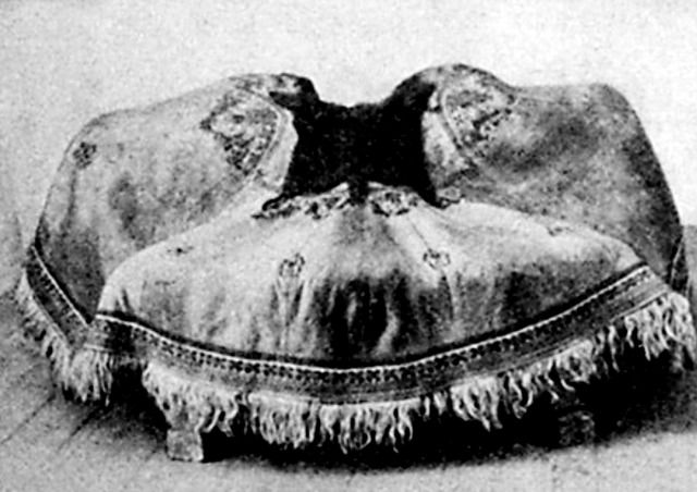 Irhás suba kiterítve, Szeged 1900 körül. A Vasárnapi Újság illusztrációja